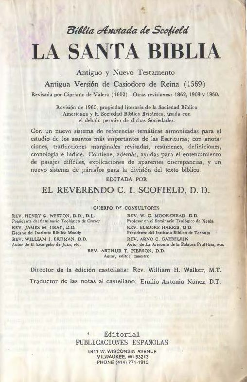 Portada de la Edición de 1985 de la Biblia Anotada de Scofield, hecha por Editorial Publicaciones Españolas